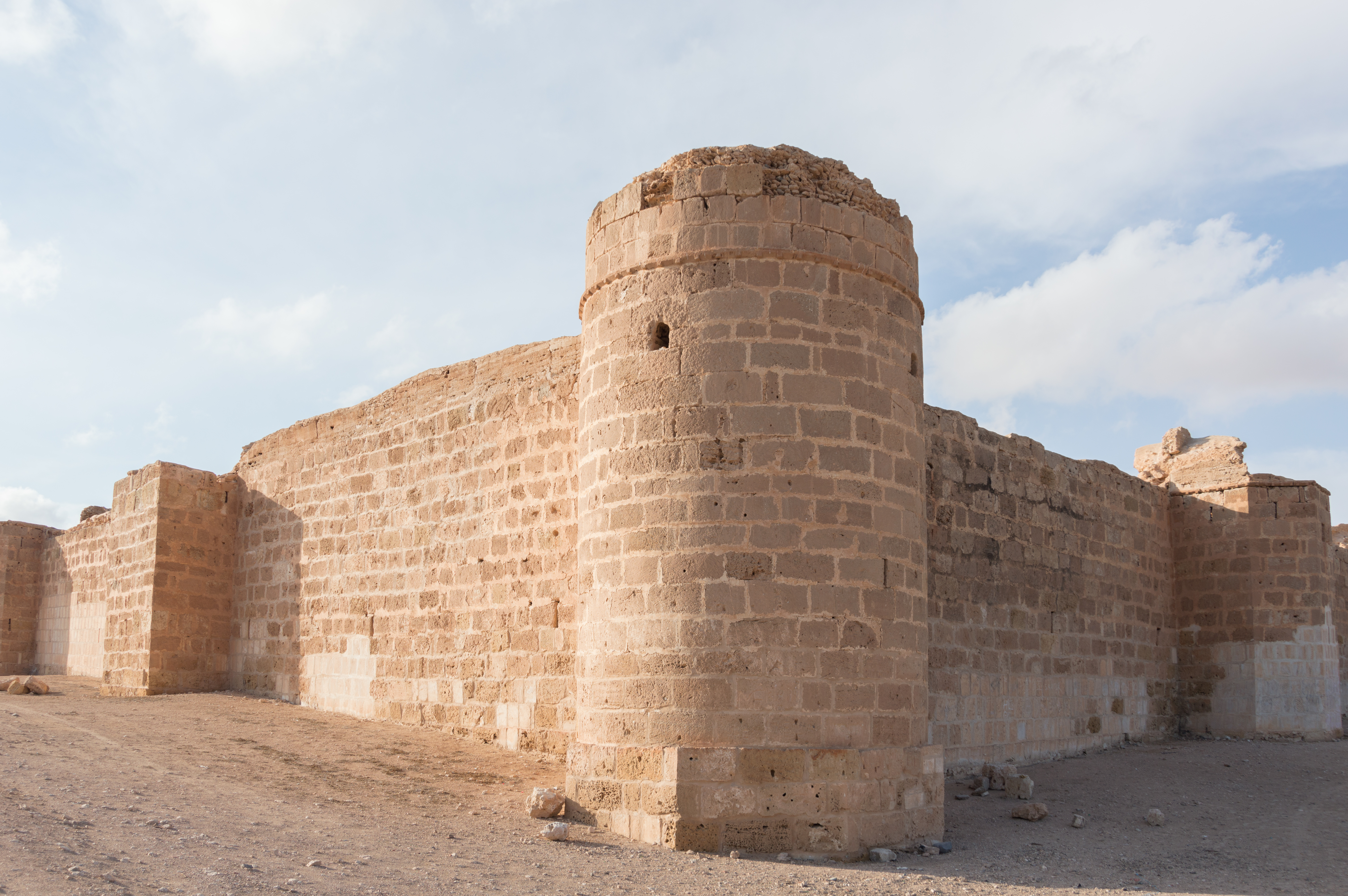 Forteresse byzantine